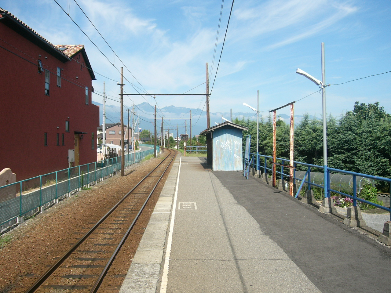 Nagisa Station